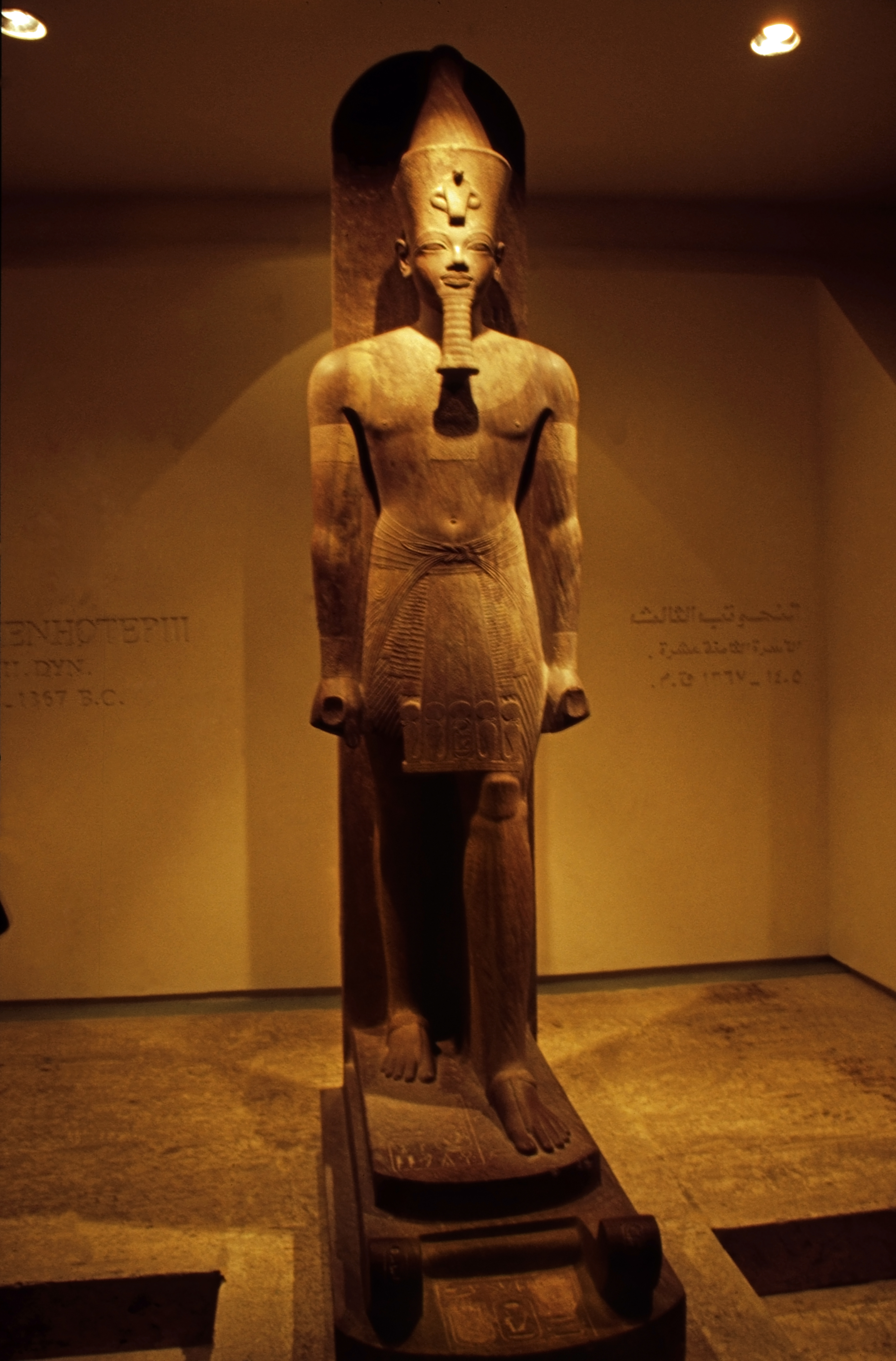 Im Luxor-Museum: Statue des Pharaos Amenhotep III.